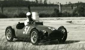 Bandini 750 sport siluro tratta da Libro: Bandini (storia della vita e automobili di Ilario Bandini)